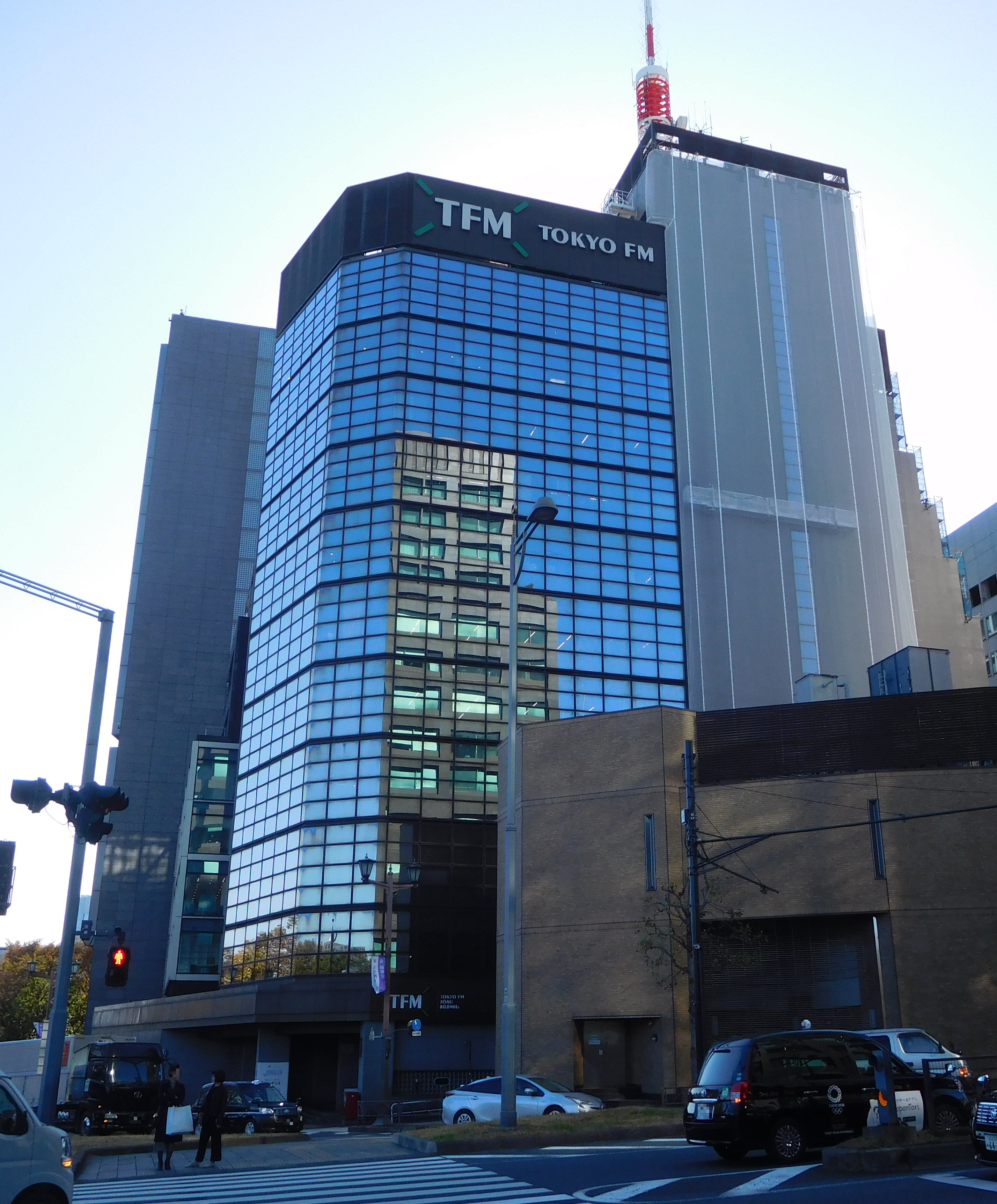 東京都千代田区麹町一丁目にある、エフエム東京本社。